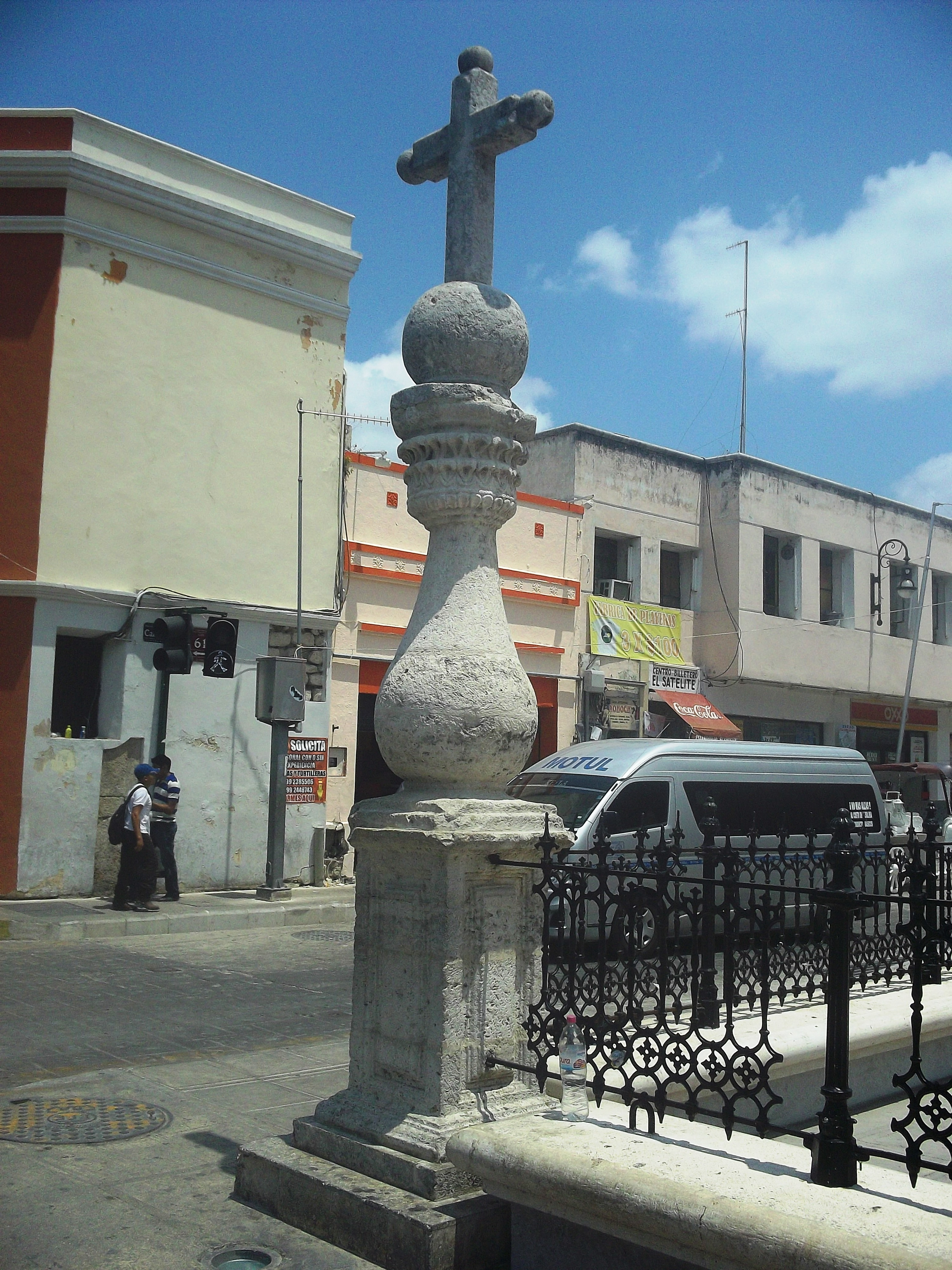 Cruz del Atrio de la Catedral de San Idelfonso, Mérida, Yucatán.